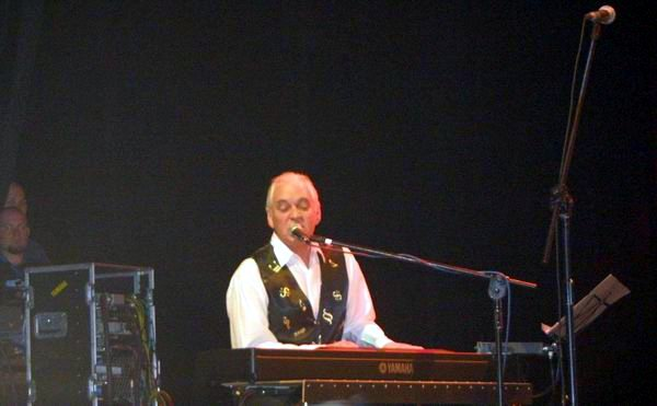 Gary Brooker 2001. autor: mzopw